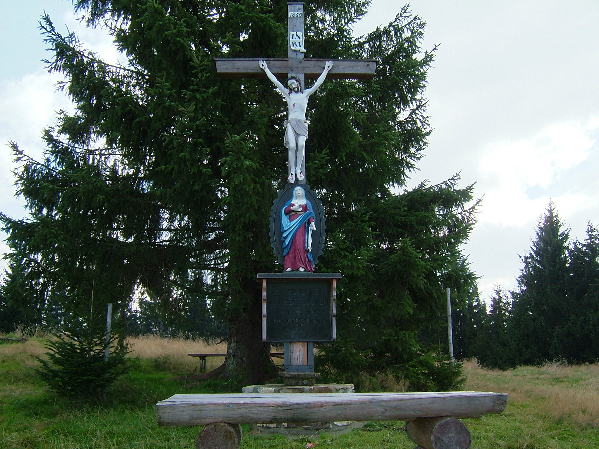 Gipfelkreuz auf dem Zinnkopf (Chiemgau) mit Gedenktafel